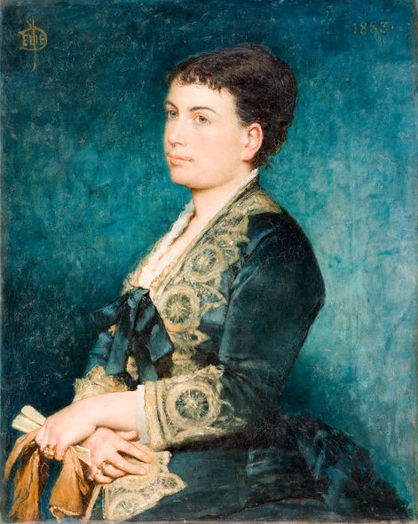 Madame Georges Guiard, née Fanny Goüin (1852-?)